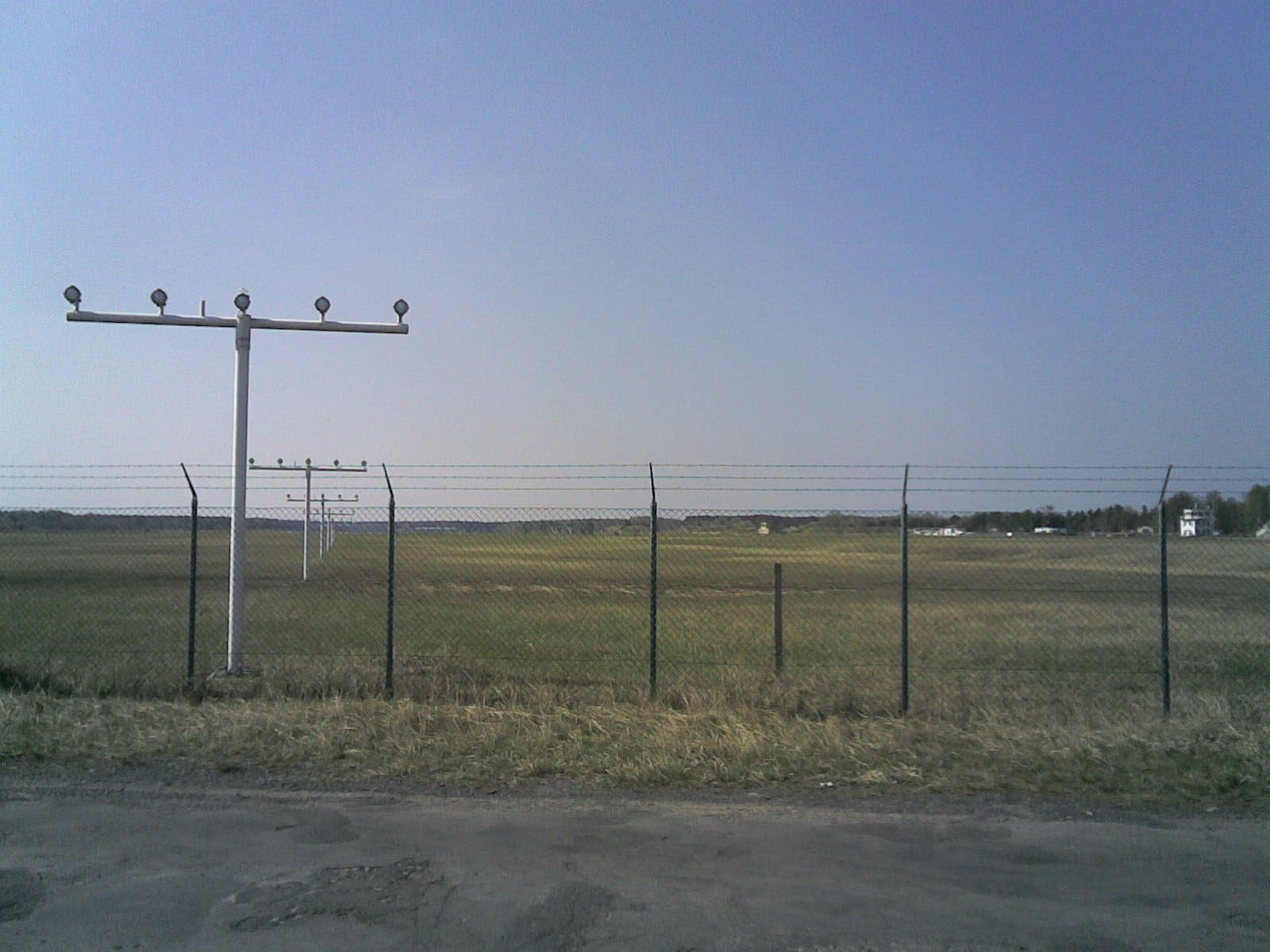 Flugplatz Finow